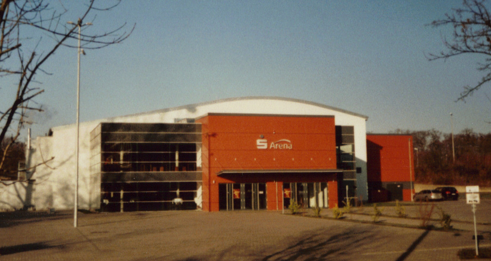 Sparkassenarena, Hildesheim